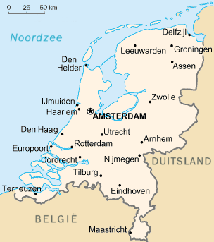 update van oude kaart van Nederland, afkomstig uit het CIA World Factbook.